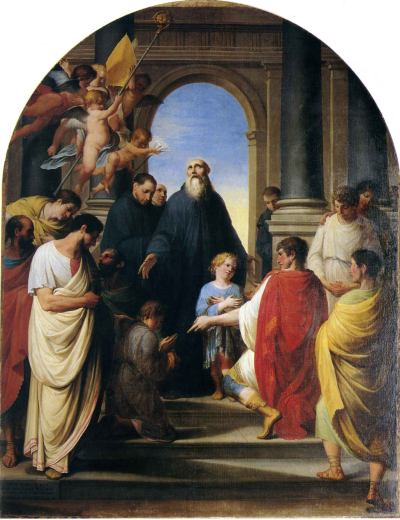 Noto(Siracusa), Chiesa del SS. Salvatore; di Giuseppe Velasco I santi Mauro e Placido presentati a San Benedetto da Norcia (1808).